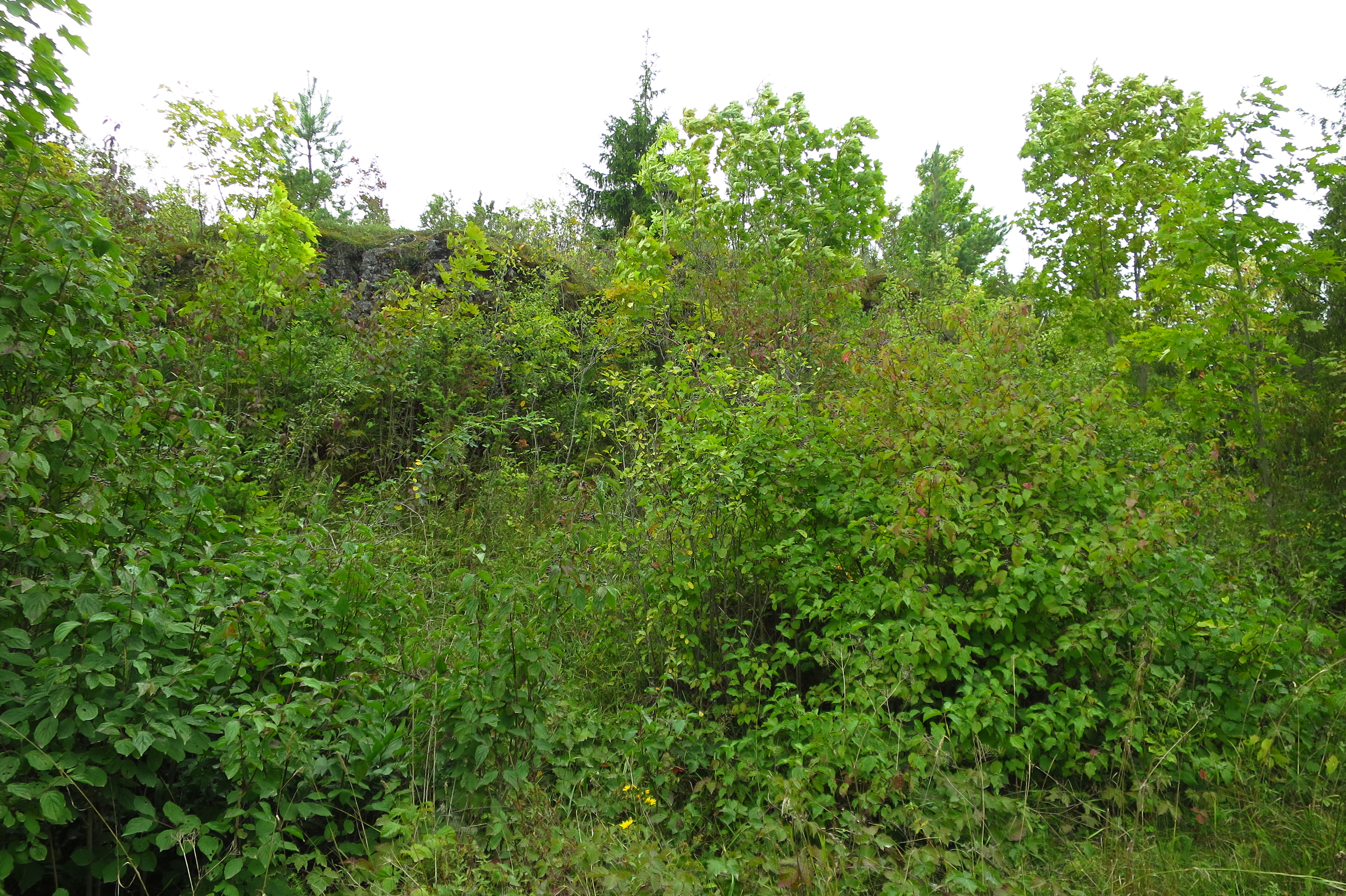 Tupenurme pank Muhumaal